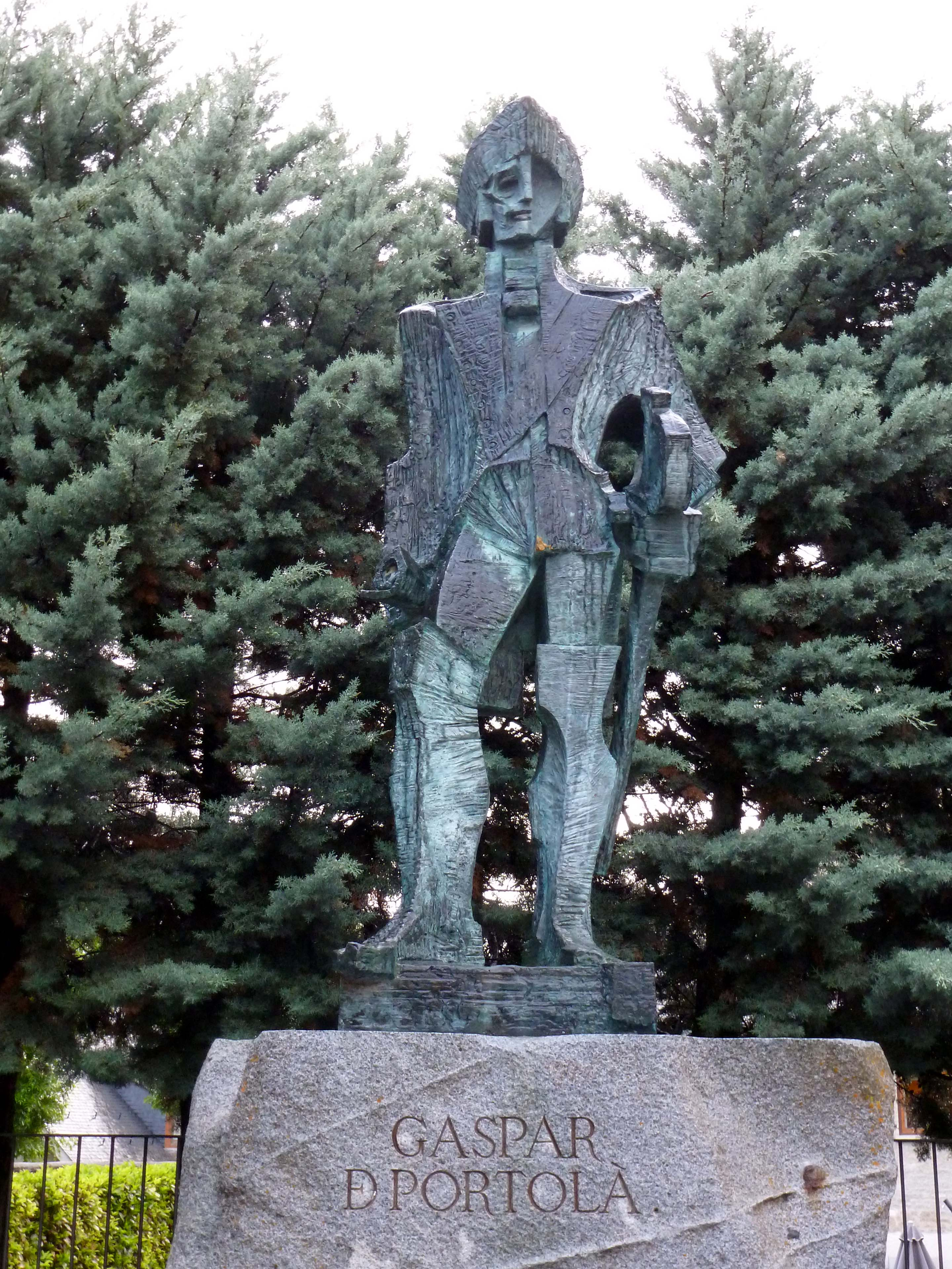 Estàtua de Gaspar de Portolà a Arties, Josep Maria Subirachs i Francesc Carulla. Reproducció de la donada per la Generalitat de Catalunya a Califòrnia i ubicada a la ciutat de Pacífica.